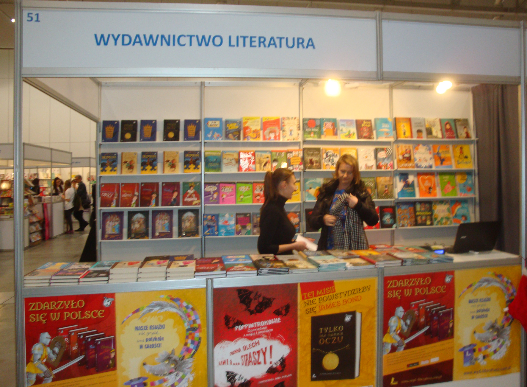 7 Salon Ciekawej Książki Łódź 2017 stoiska wydawnictw 7 fot M Z Wojalski